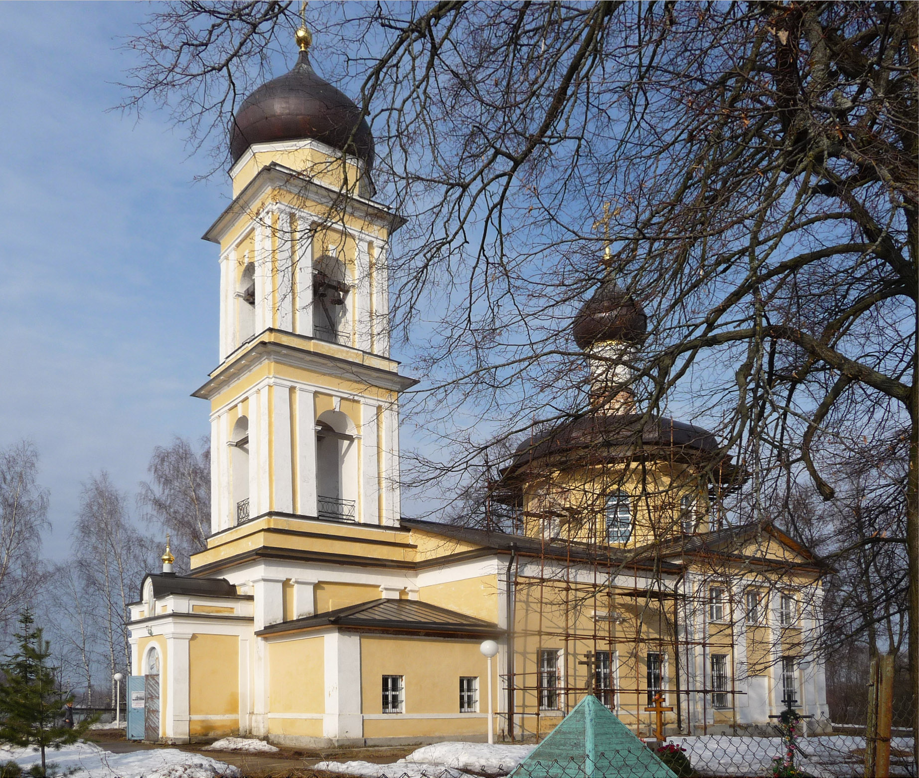 Церковь Николая Чудотворца в селе Здёхово. Щелковксий район Московской области.